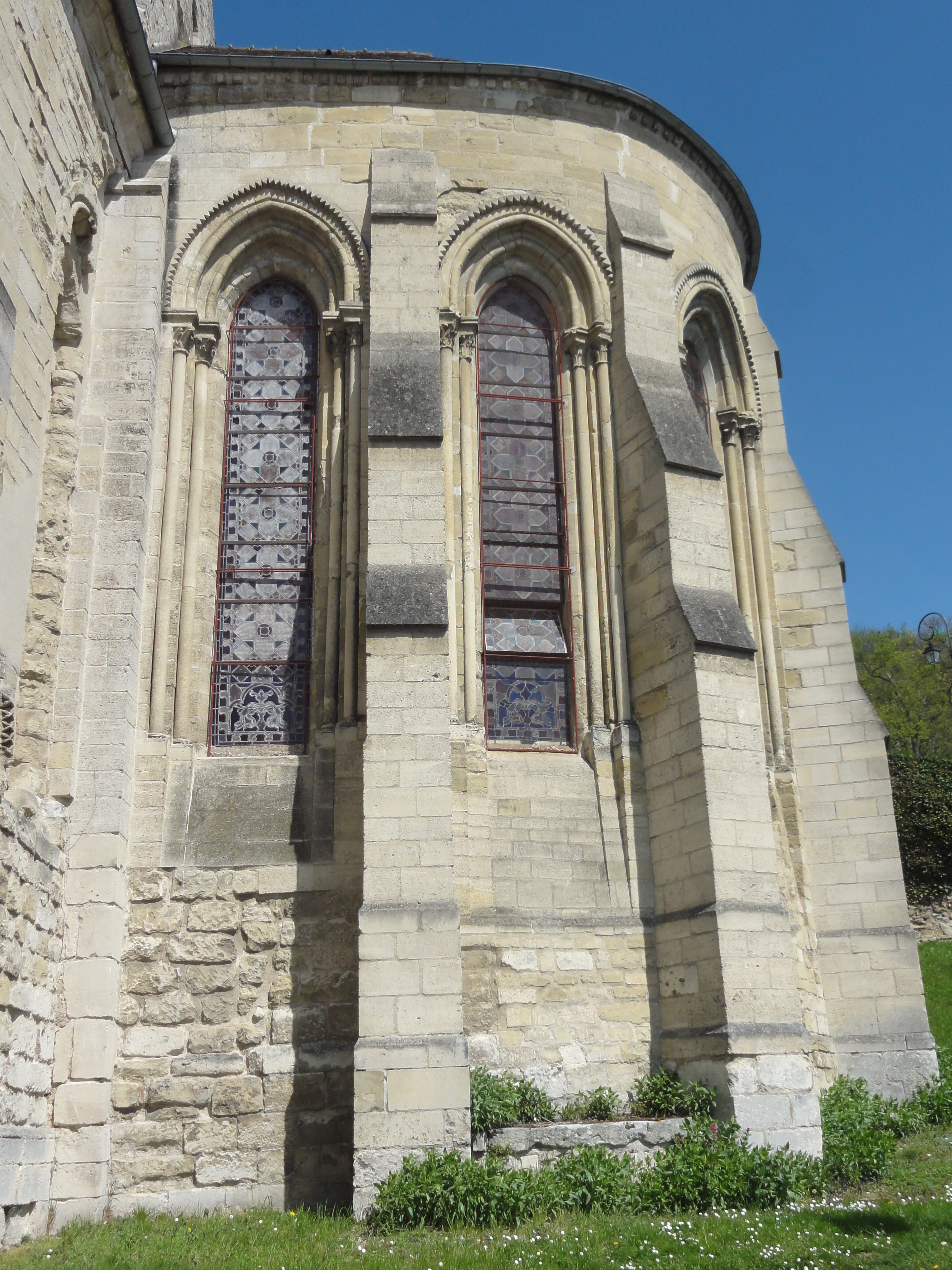 Église Saint-Pierre-aux-Liens de Vaux-sur-Seine - voir titre.